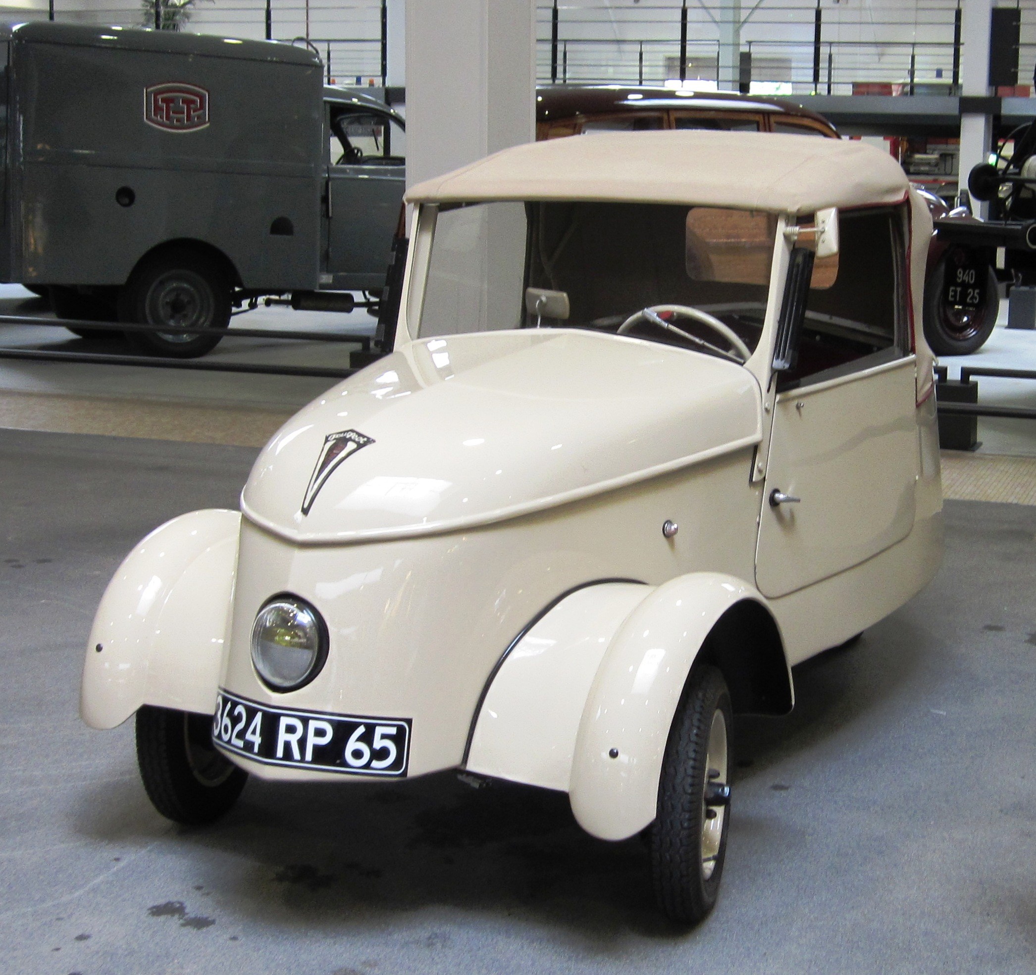 Peugeot Voiture Légère de Ville (vers 1942) Musée de l'Aventure Peugeot. Selon l'etiquette (2012): Pendant la deuxième guerre mondiale le rationnement d’essence incita les constructeurs à rechercher des sources d’énergie de remplacement. Peugeot fut le seul grand constructeur à s’intéresser a ce mode de propulsion et provoqua la surprise en annoncent le 1er mai 1941 la sortie de sa « VLV ». Présenté sous la forme d’un mini cabriolet, a deux places décollées, ce véhicule économique destinée a un usage urbain, fut plus particulièrement utilise par les postiers ou les médecins. 377 exemplaires furent produits de 1941 à 1945. Caractéristiques techniques : Moteur électrique, 3,3 ch., alimente par 4 batteries de 12 volts, autonomie de 75 a 80 km. Vitesse maximum 36 km/h.